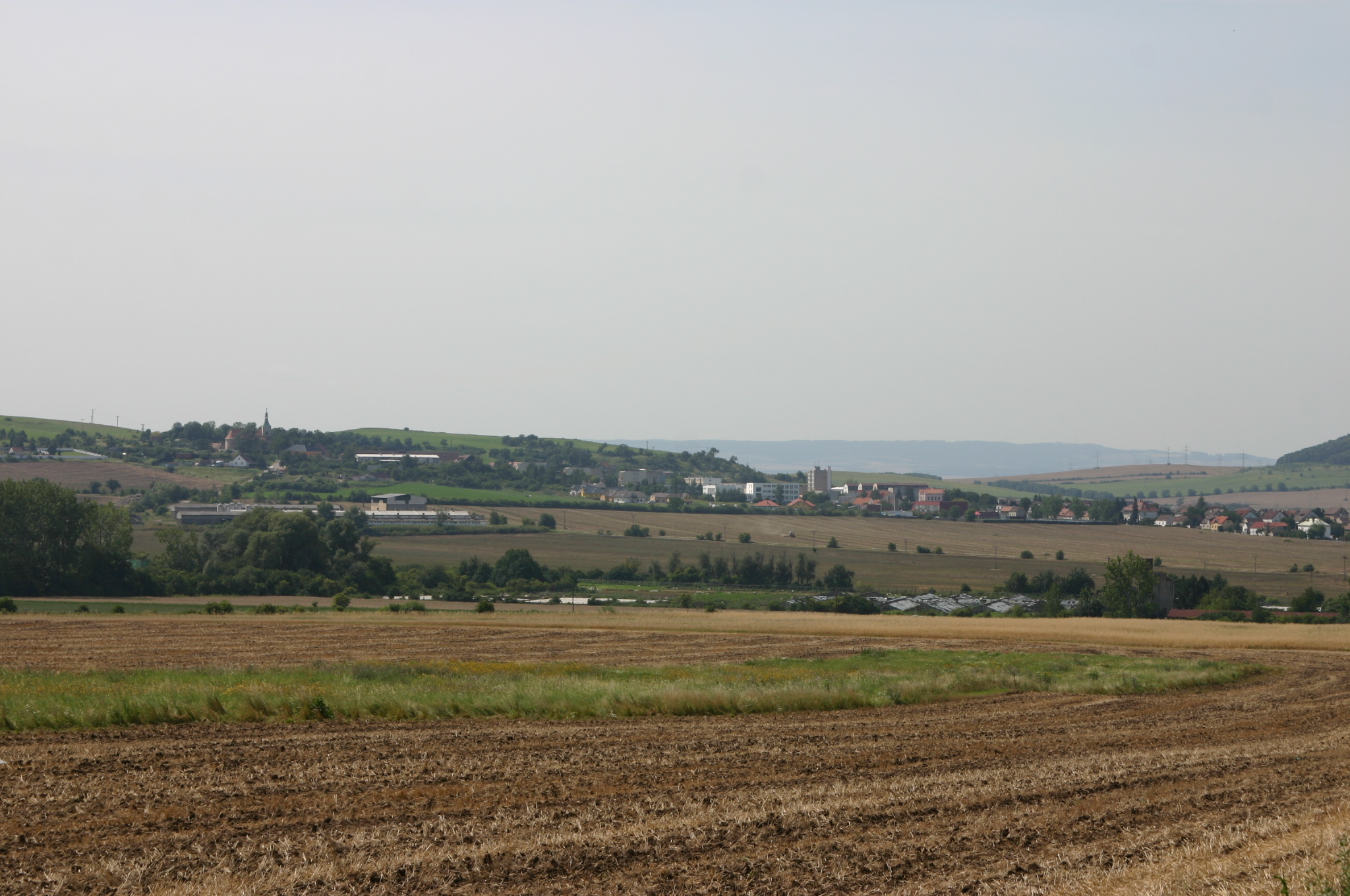 Obec Bečov v okrese Most, pohled od severu